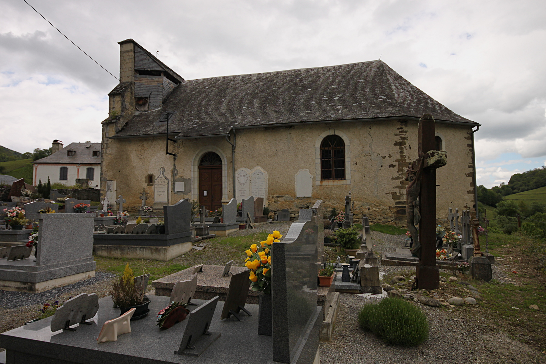 Église de la Nativité de la Sainte Vierge à 65060 Banios dans les Baronnies, Hautes-Pyrénées.